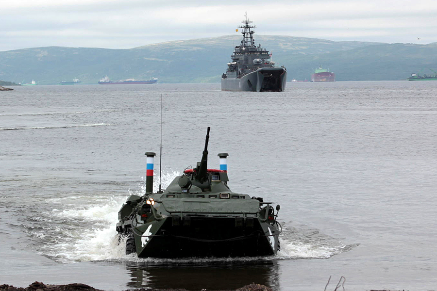 Морские пехотинцы Северного флота отработали высадку морского десанта с БДК на бронетранспортерах.